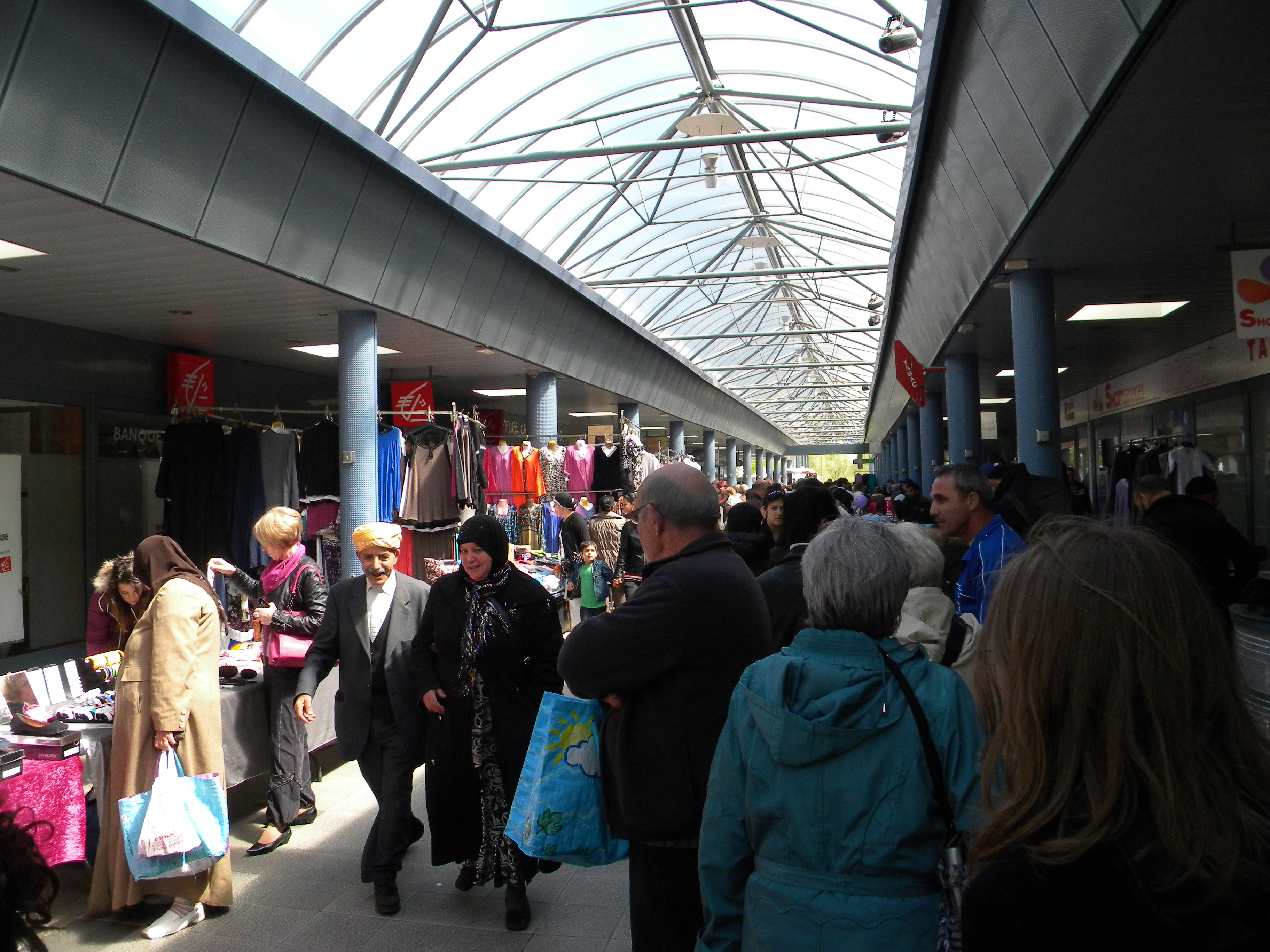 Bazaro